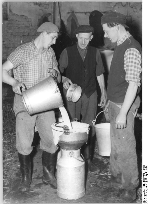 Donnin, Bauern beim Umfüllen von Milch Zentralbild - Sturm He.-Sta.xx lo Not. 27.4.1954 Patristische Initiative der Melkerbrigade Kunz. Unsere Werktätigen auf dem Lande stehen im Jahr der grossen Initiative hinter den Kollegen der Industriebetriebe nicht zurück. Die Mitglieder der Melkerbrigade Kunz vom Volksgut Donnin, Kreis Anklan, übernahmen die Verpflichtung, 1954 pro Kuh 250 kg Milch mehr zu erzeugen als im Vorjahr. Das bedeutet, dass allein das Volksgut Dennin in diesem Jahre 1.500 kg Butter zusätzlich für die Versorgung liefern wird. Die Brigade konnte diese Verpflichtung eingehen, weil sie wissenschaftliche Fütterungsmethoden anwenden, eine genaue Leistungskontrolle bei jedem Tier durchführen und durch die Einrichtung des Zwischenfruchtanbaues die Tiere von Frühjahr bis zum Herbst mit Grünfutter versorgen kann. UBz: Mitglieder der Brigade Kunz (vlnr) Heinz Schmiel, Ferdinand Kunz, und Helmut Saager im Kuhstall.